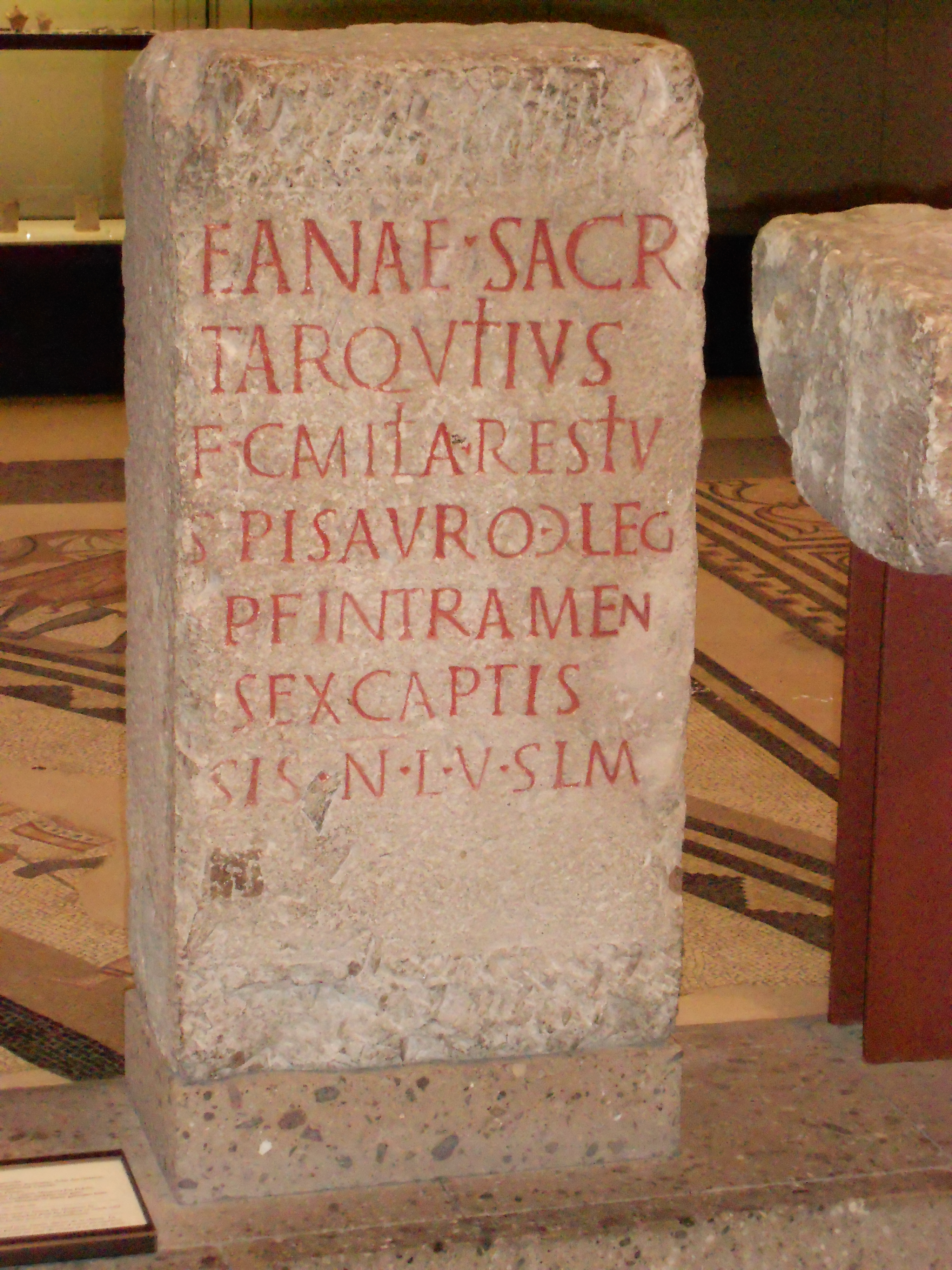 Votivgabe eines Bonner Centurios für Diana, nachdem es ihm gelang 50 Bären innerhalb nur eines halben Jahres zu fangen, Römisch-Germanisches Museum, Köln. Text: Deanae Sacrae Q(uintus) Tarquitius Q(uinti) f(ilius) Camilia restitutus Pisauro ) (= centurio) leg(ionis) I M(invervae) P(iae) F(idelis) intra menses sex captis ursis n(umero) L v(otum) s(olvit) l(ibens) m(erito) CIL XIII 12048 = RSK 14 = IKoeln 19 = AE 1910, 61